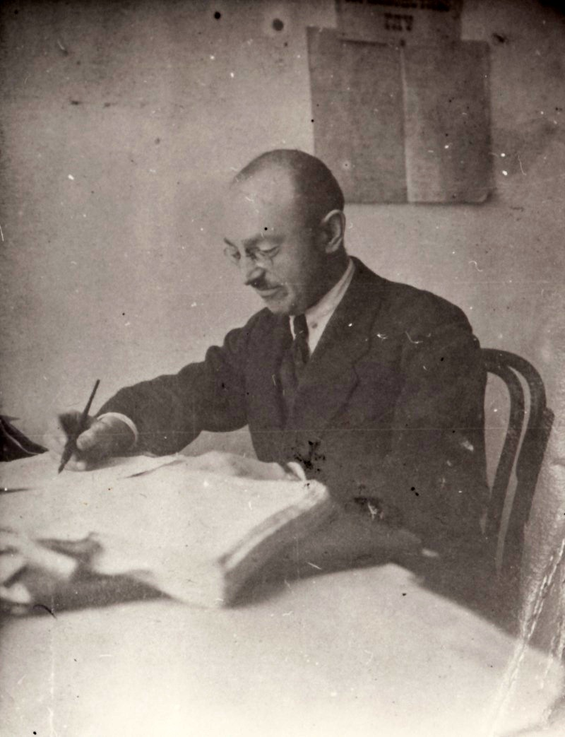 Валентин_Отамановський_у_робочому_кабінеті._1925_рік..jpeg: Валентин Отамановський у робочому кабінеті в Мурах